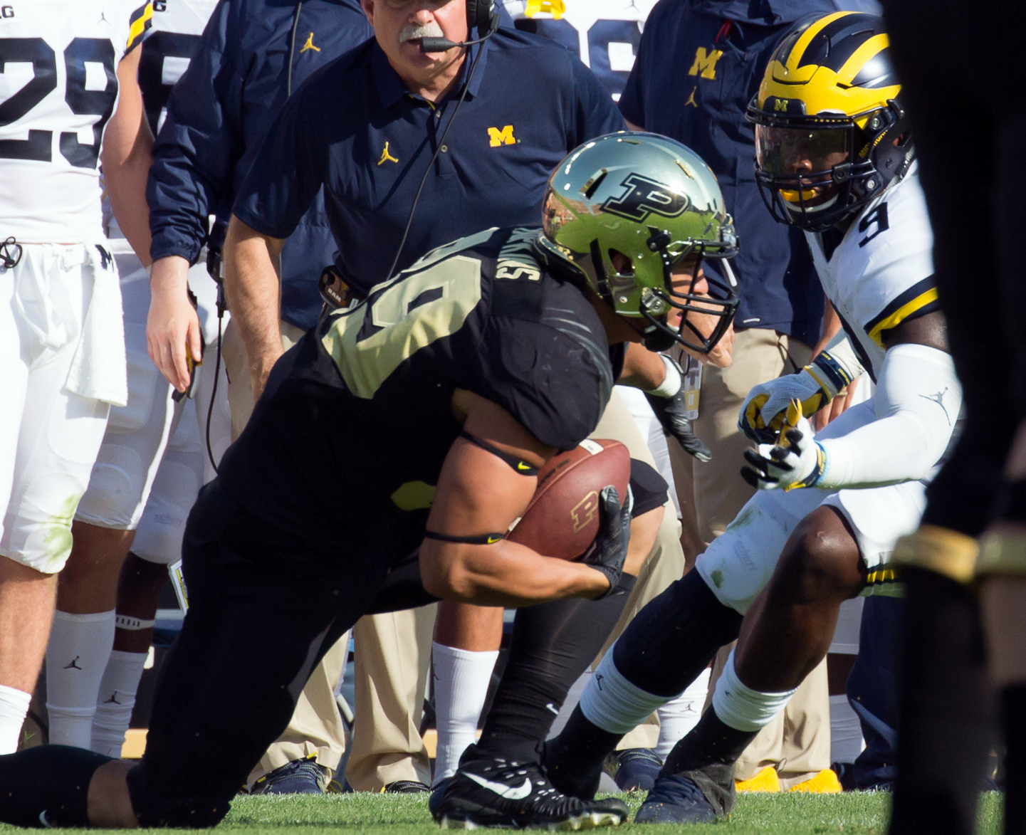 PAB_MichiganAtPurdue2017_63